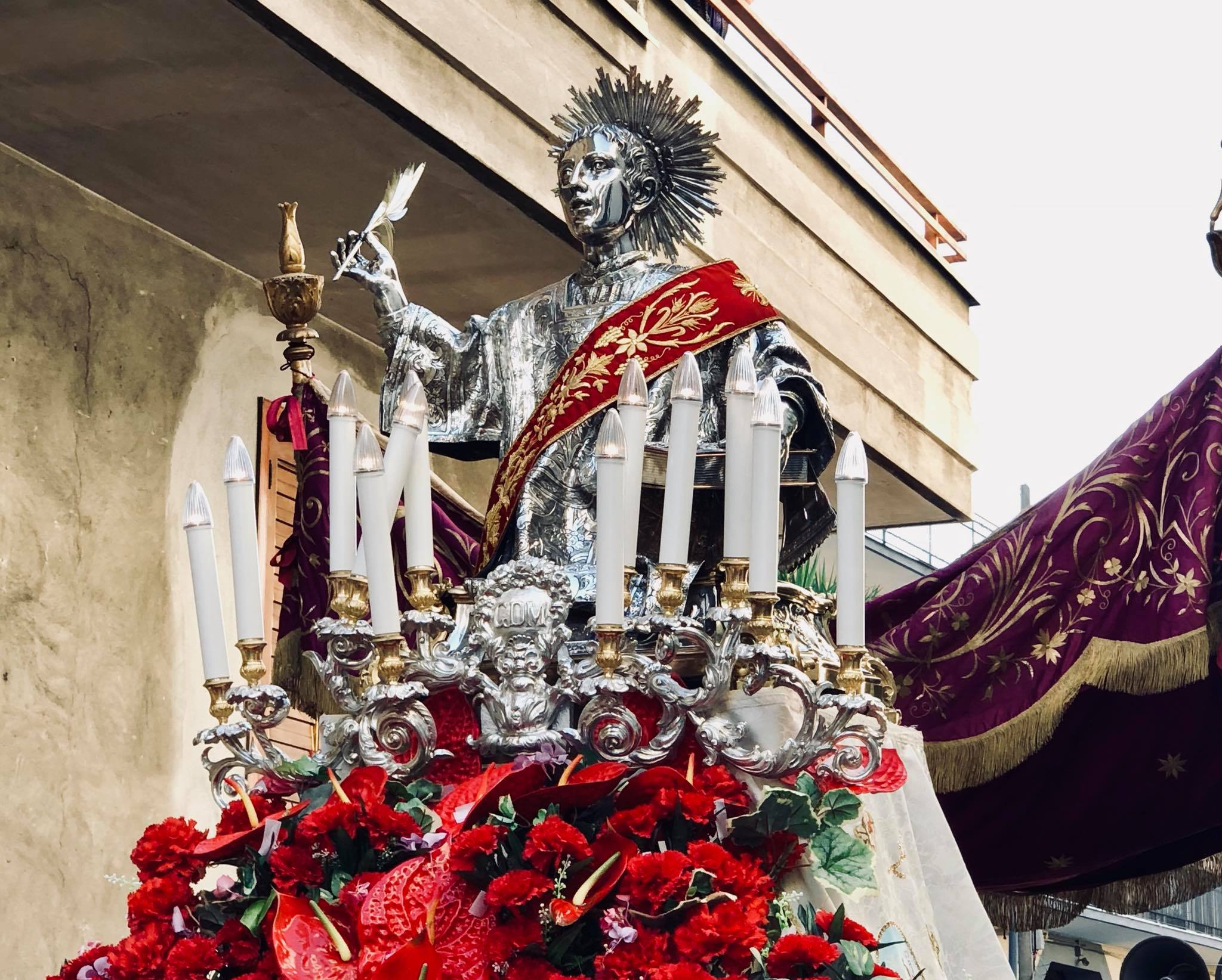 Processione di San Cesario con baldacchino, Cesa (Ce)